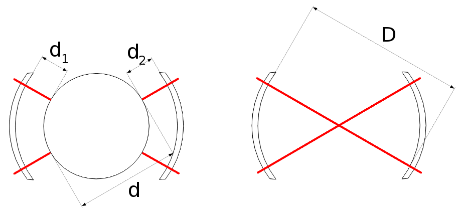 Skizze zum Messprinzip des Kugelinterferometers